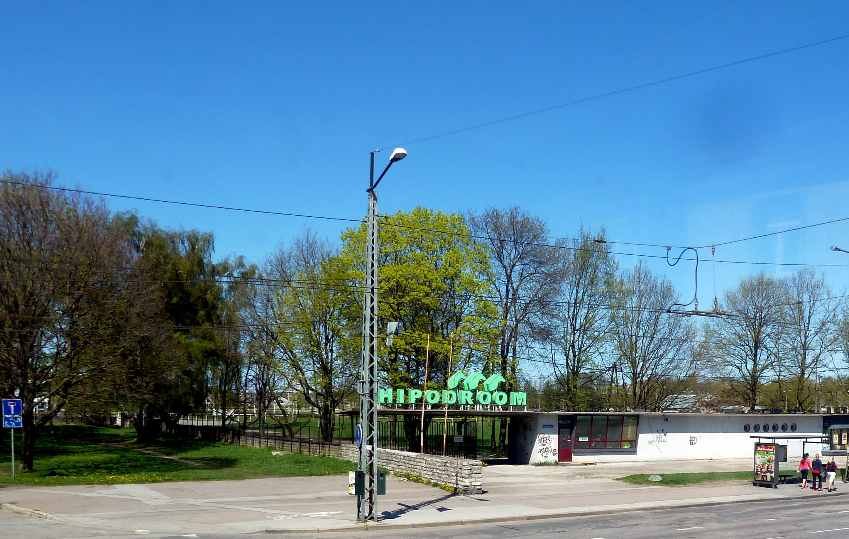 Tallinna Hipodroom